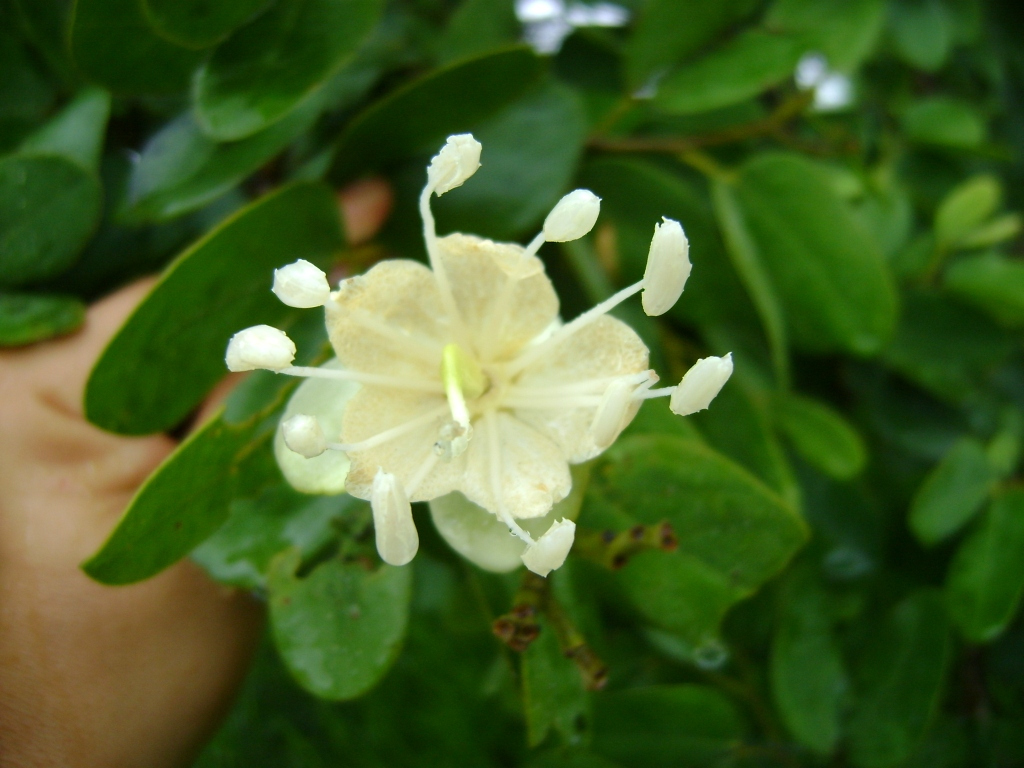 Floro de Hymenaea courbaril.